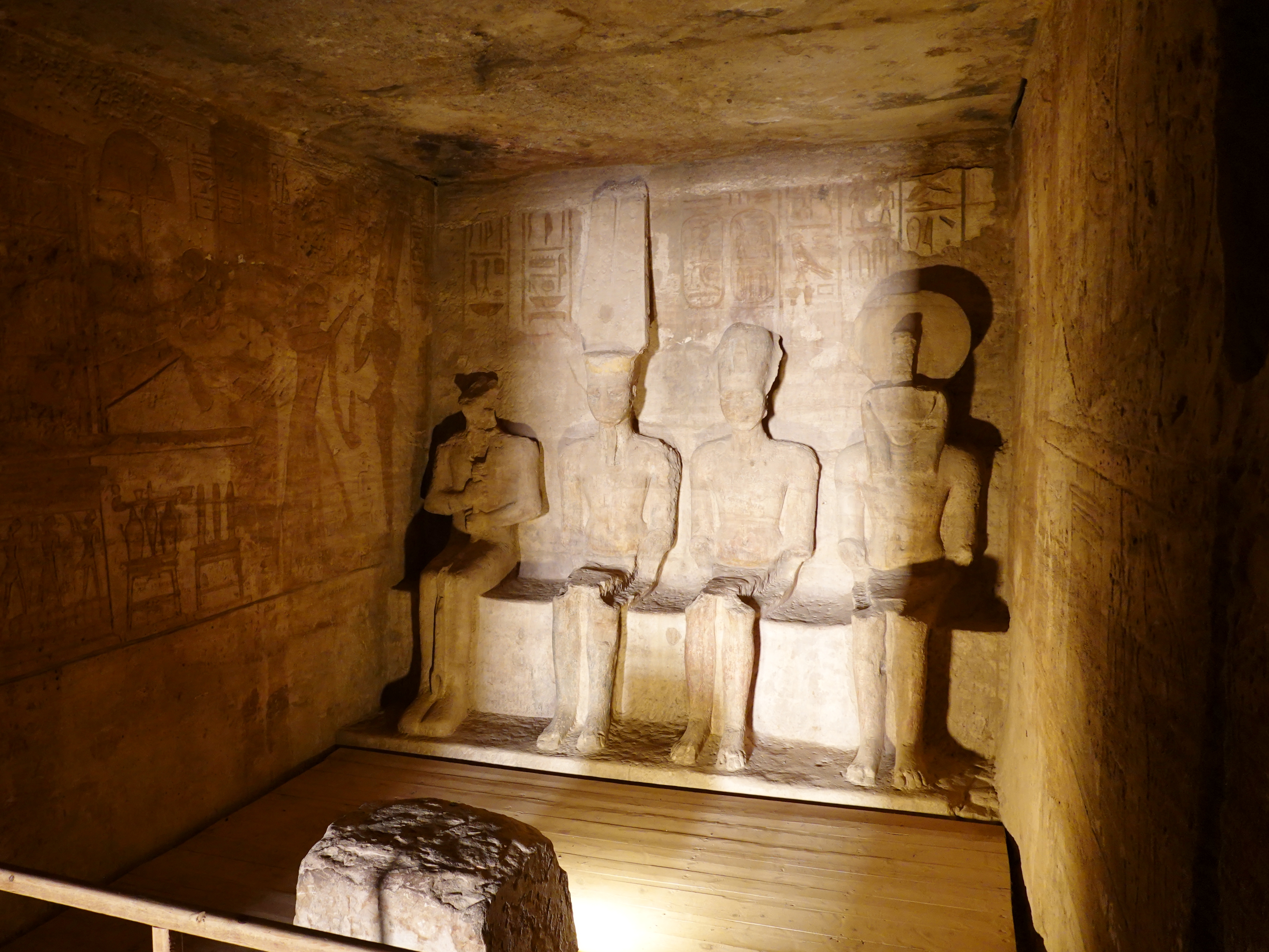 Heiligtum des großen Tempels von Abu Simbel, Ägypten